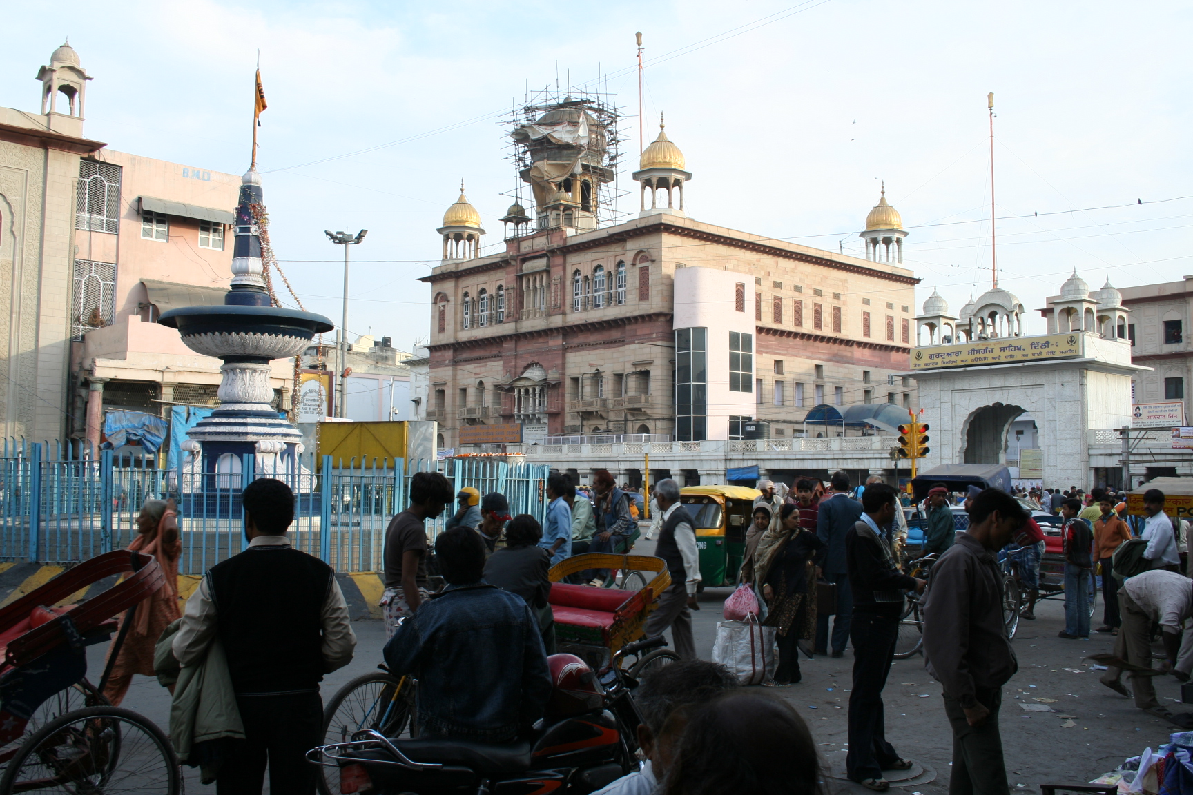 Gurudwara Sis Ganj